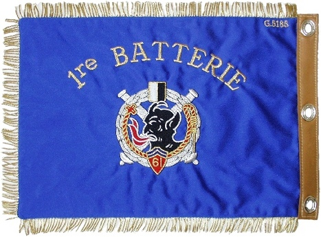 fanion de la 1ère Batterie du 61ème RA